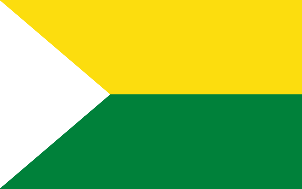 Bandera de La Troncal